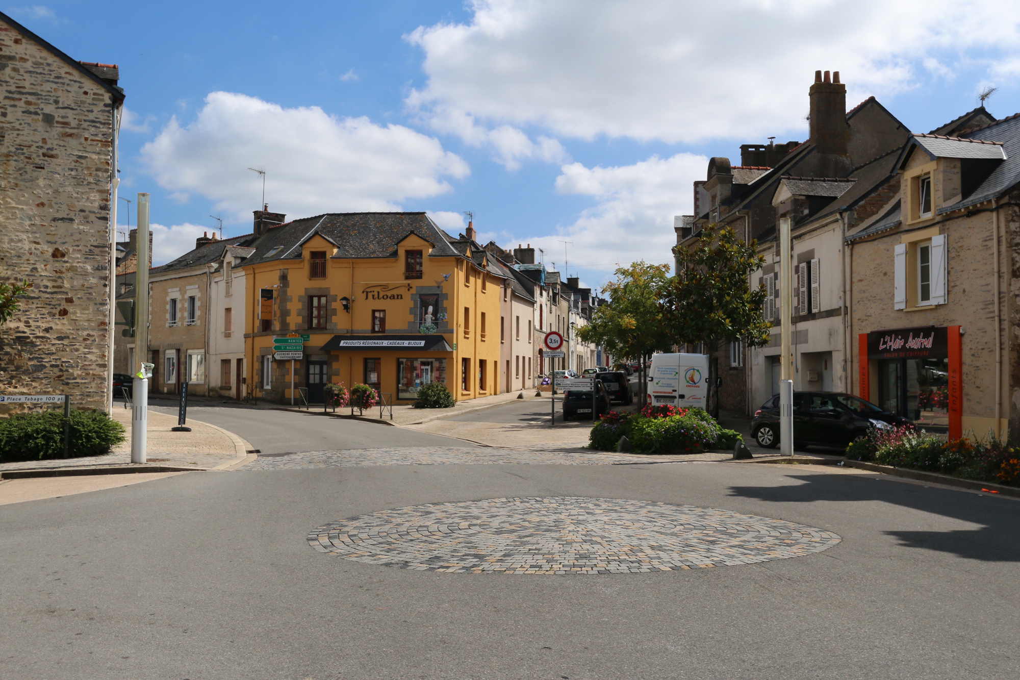 Ville de St-Nicolas-de-Redon